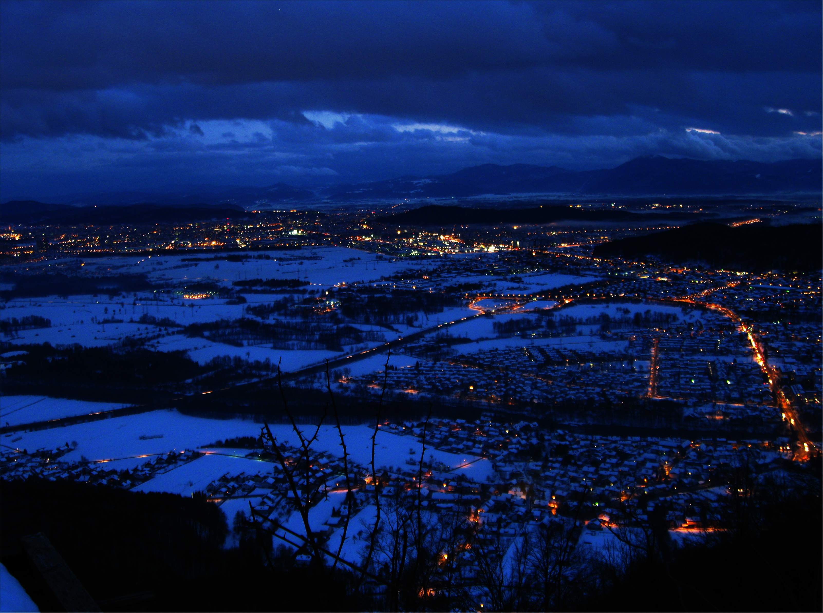 Ljubljana noću.